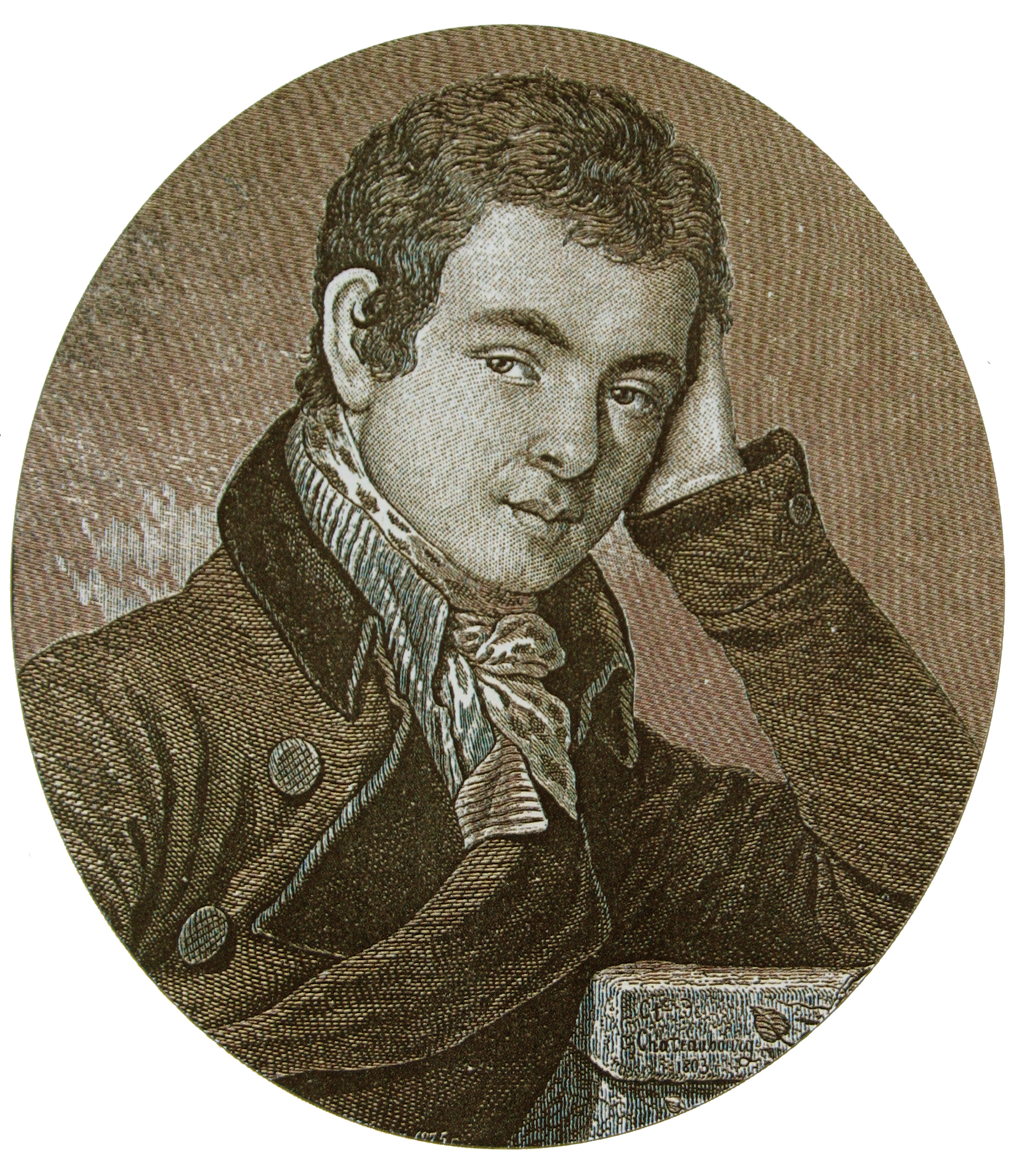 В.Н. Каразин. Гравюра на дереве Л. Серякова (1875 года) с миниатюры Дешатобура (1803 года).